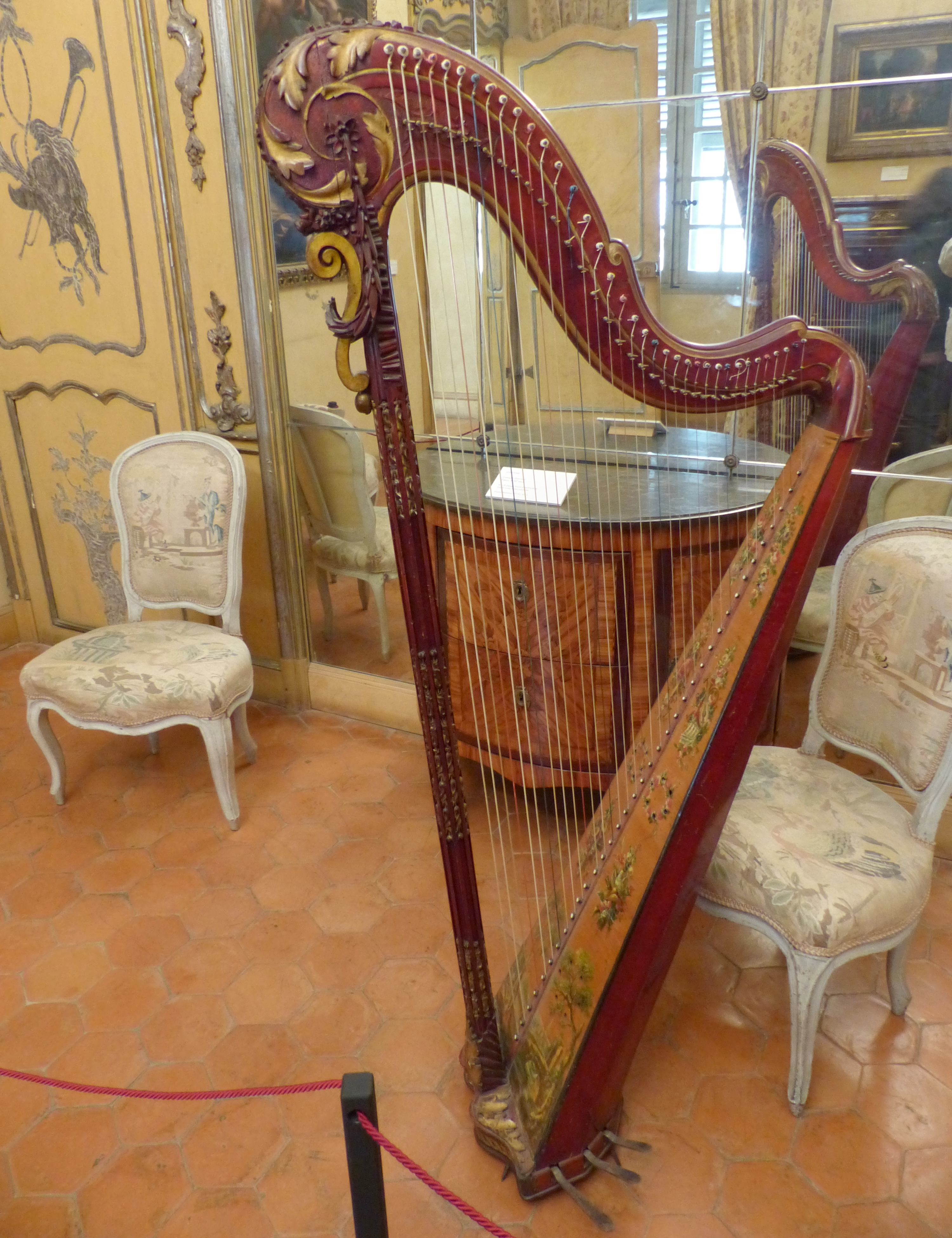 Nice (Alpes-Maritimes, France), au cœur du Vieux Nice, le palais Lascaris avec, entre autres, sa fabuleuse collection d'instruments de musique anciens, la deuxième de France.